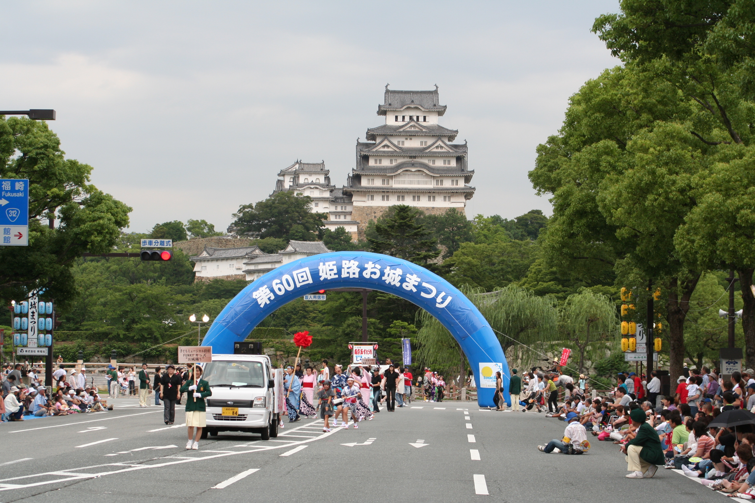 姫路お城祭。兵庫県姫路市にて毎年7月末から8月2日の3日間に渡り姫路城の南部大手前通りにて開催される祭である。第60回開催の2日目の祭の様子。